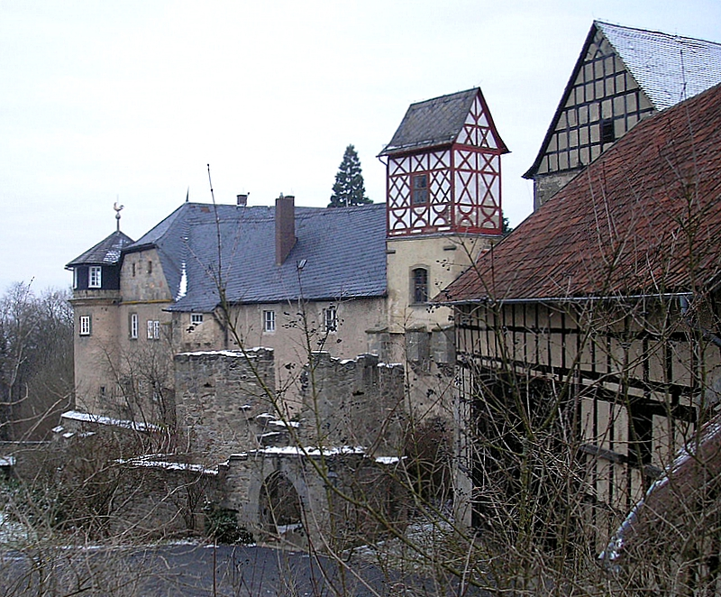 Burg Lichtenstein, Südburg (Gemeinde Pfarrweisach, Landkreis Haßberge, Unterfranken). Die Südburg von der Terrasse des Burggasthofes. Eigene Aufnahme, Dez. 2007 / Lichtenstein castle near Pfarrweisach (Lower Franconia, Germany). Southern castle, seen from the terrace of the Castle Inn. Own photo, Dec. 2007